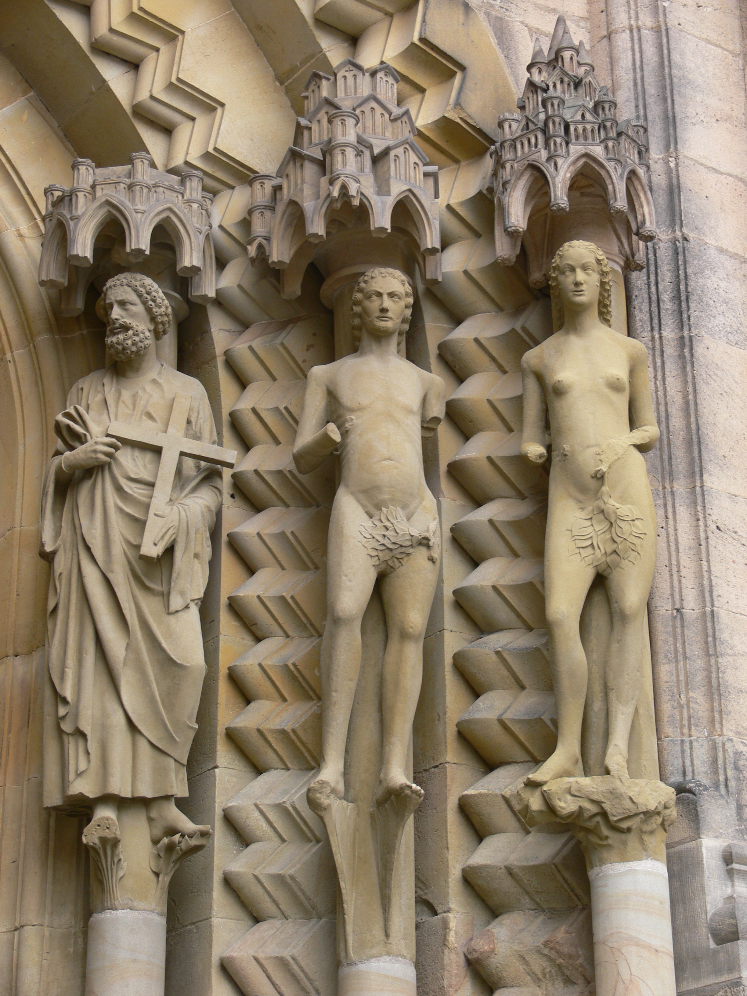 Bamberg, Dom St. Peter und St. Georg Adamspforte